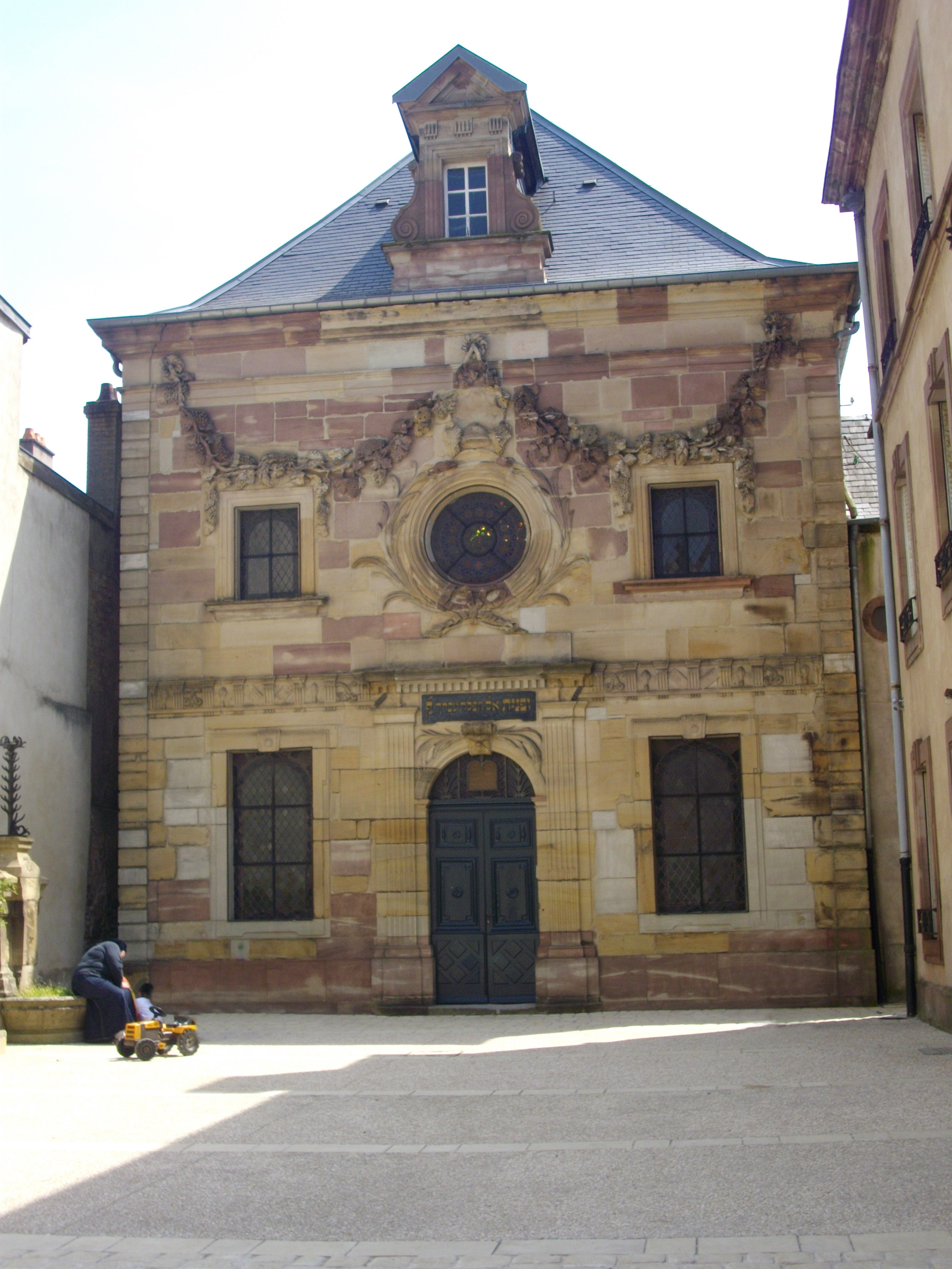 Synagogue de Lunéville (Meurthe-et-Moselle)